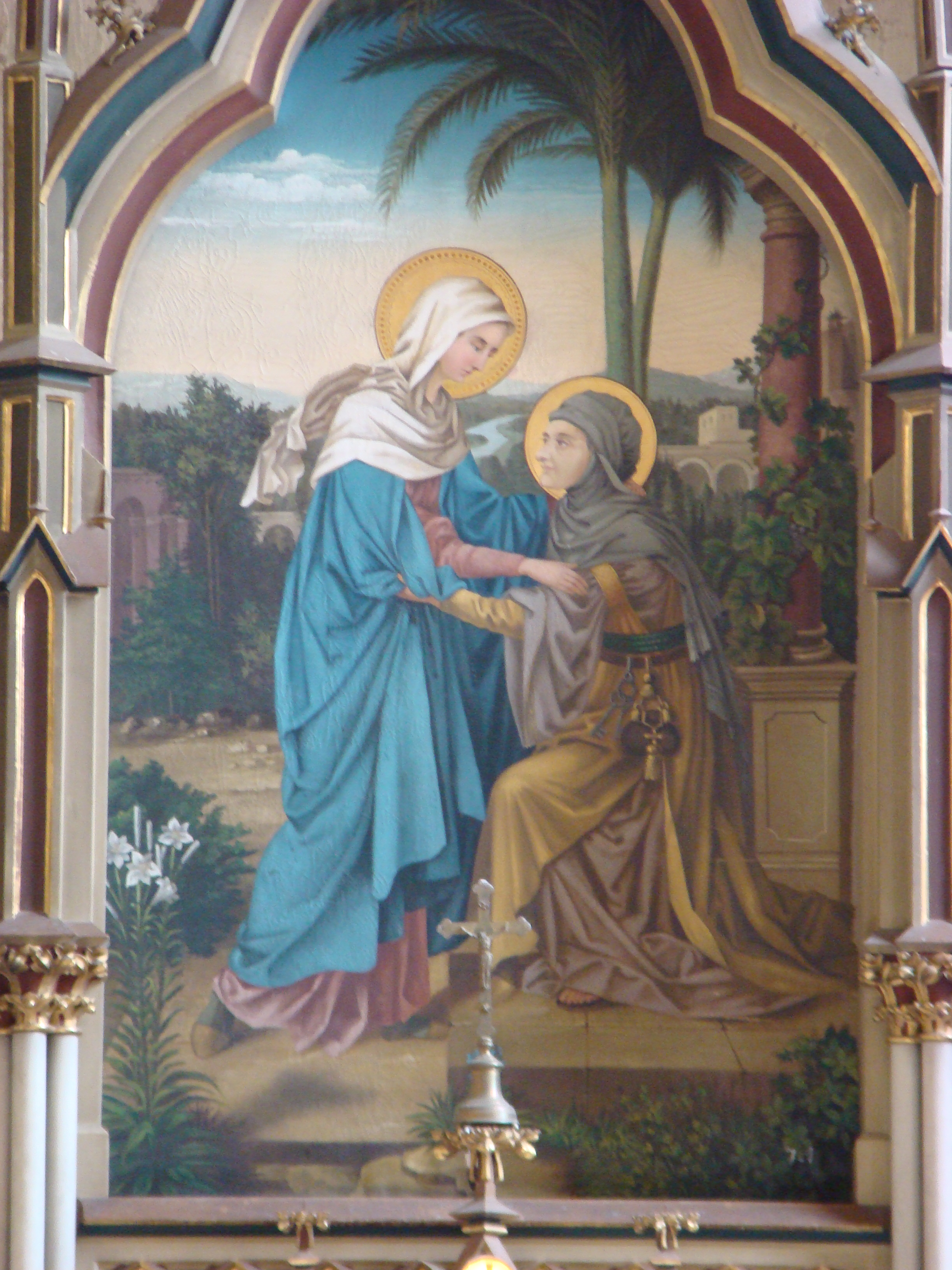 Mănăstirea franciscană, sat BAIA DE CRIŞ; comuna BAIA DE CRIŞ